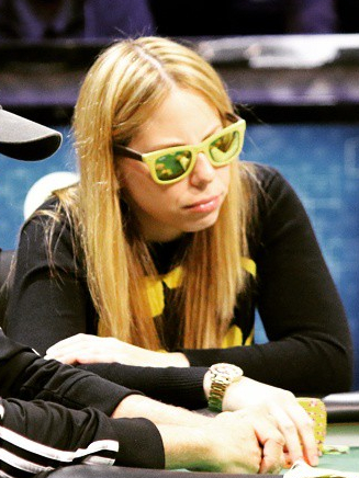 Loni Harwood bei der World Series of Poker 2015